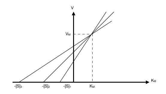 Représentation graphique de l'équation de Michaëlis-Menten selon Eisenthal et Cornish-Bowden.